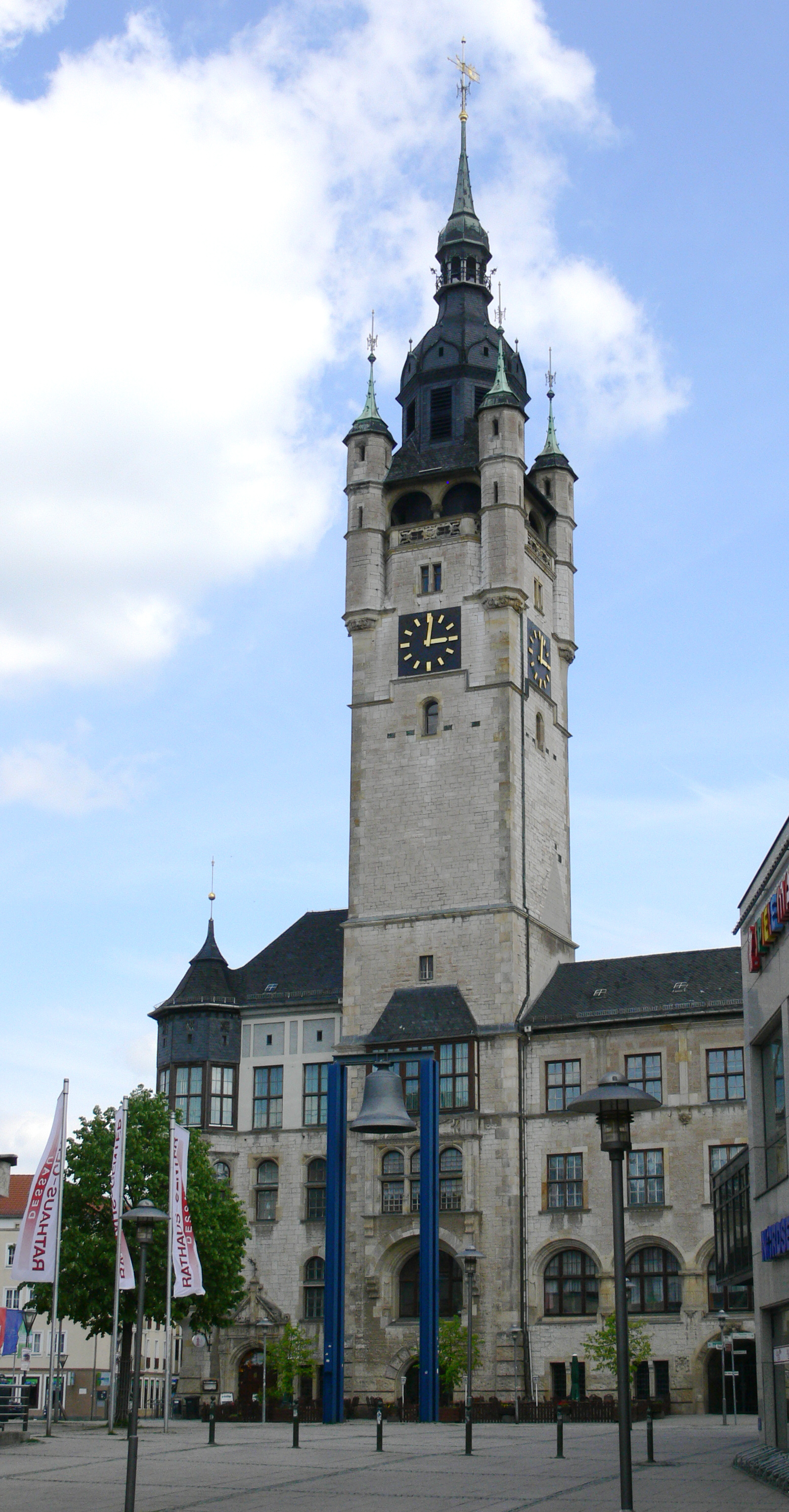 Dessau-Roßlau, Rathaus Dessau